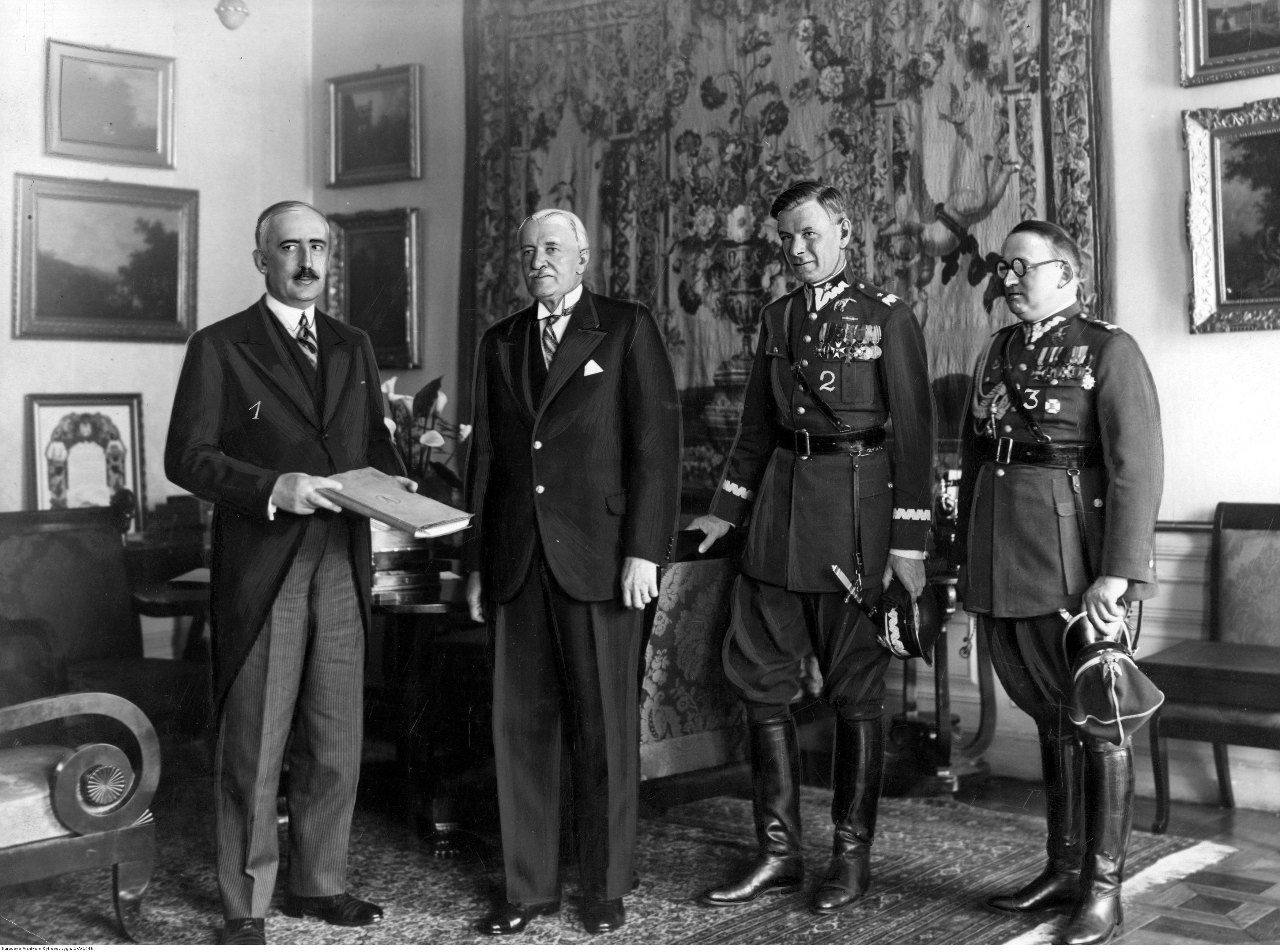 Prezydium Zarządu Głównego Aeroklubu RP na audiencji u prezydenta RP Ignacego Mościckiego (2. z lewej). Widoczni także: prezes Aeroklubu RP Janusz Radziwiłł (1. z lewej), generał Ludomił Rayski (2. z prawej), sekretarz generalny Aeroklubu RP ppłk Bogdan Kwieciński (1. z prawej). Koncern Ilustrowany Kurier Codzienny - Archiwum Ilustracji. Sygnatura: 1-A-1446